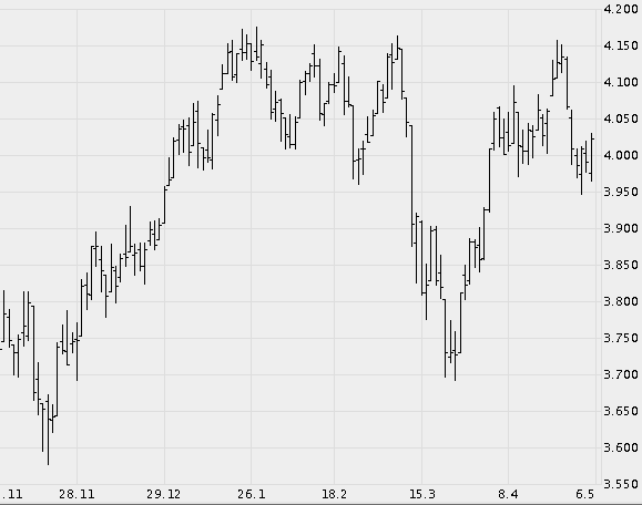 Balkenchart vom aktuellen DAX!